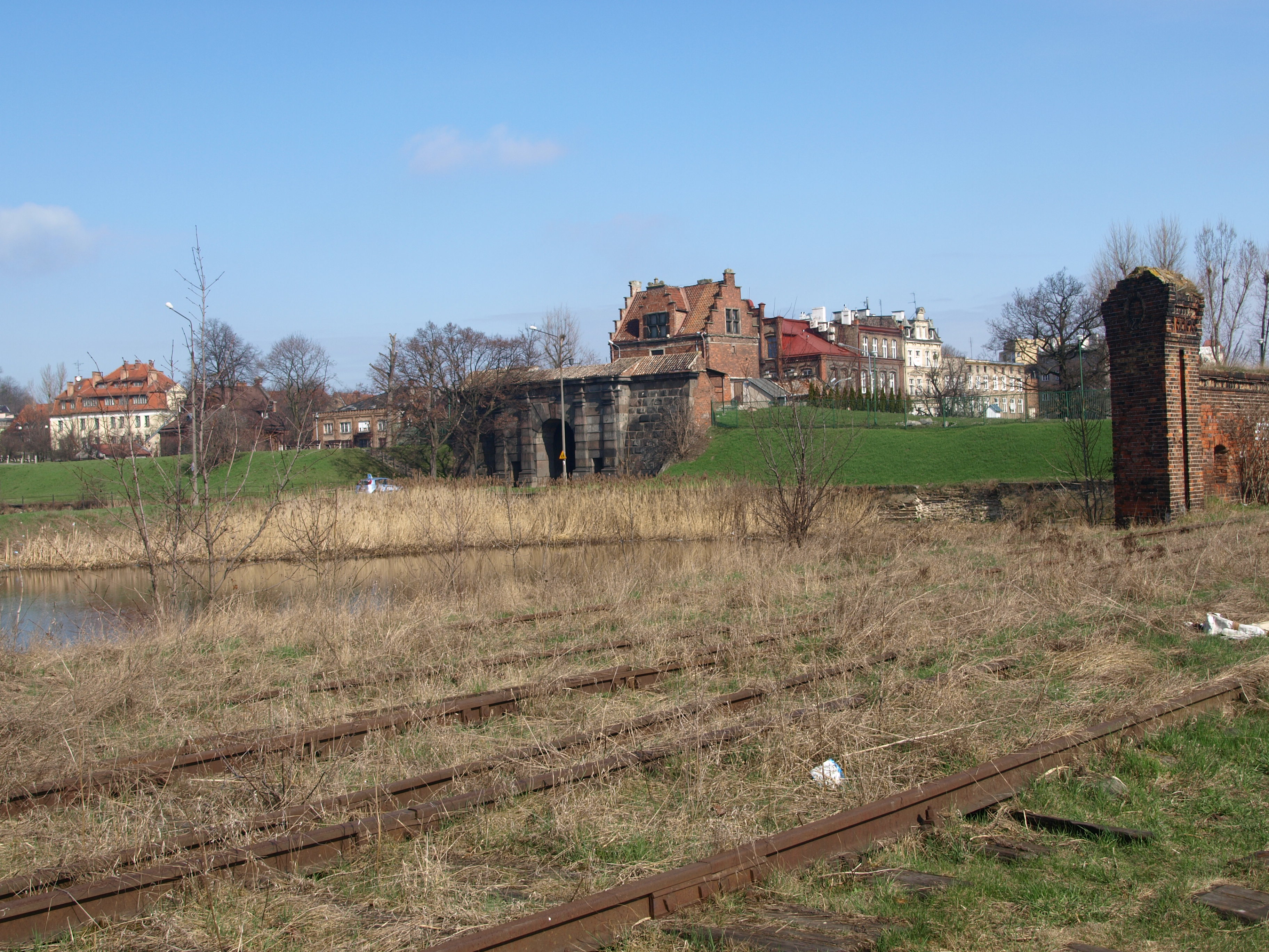 Brama Nizinna w Gdańsku.